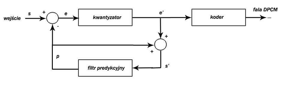 Nadajnik dla modulacji DPCM